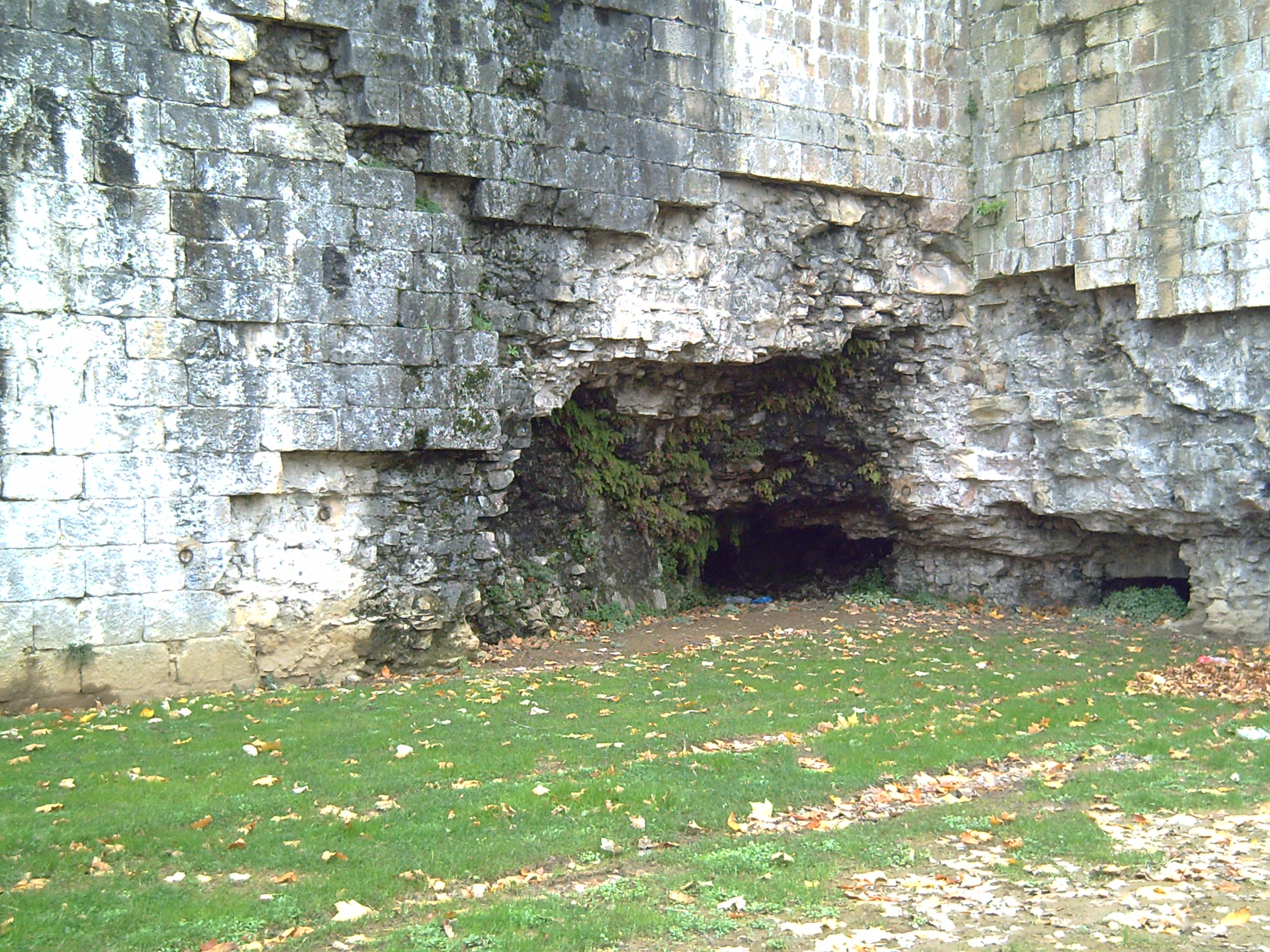 Hondarribiko harresien frantsesek irikitako mina bat.